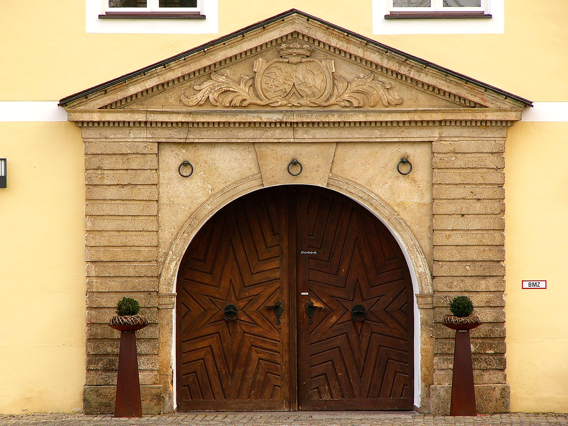 Rottenburg an der Laaber, Niederhatzkofen, ehemaliges Wasserschloss; jetzt Krankenhaus, Portal mit Allianz-Wappen des Freiherrn Wiguleus Xaver Aloisius v. Kreittmayr und seiner Gemahlin Maria Franziska Walburga, geb. Freiin v. Frönau. This is a photograph of an architectural monument.